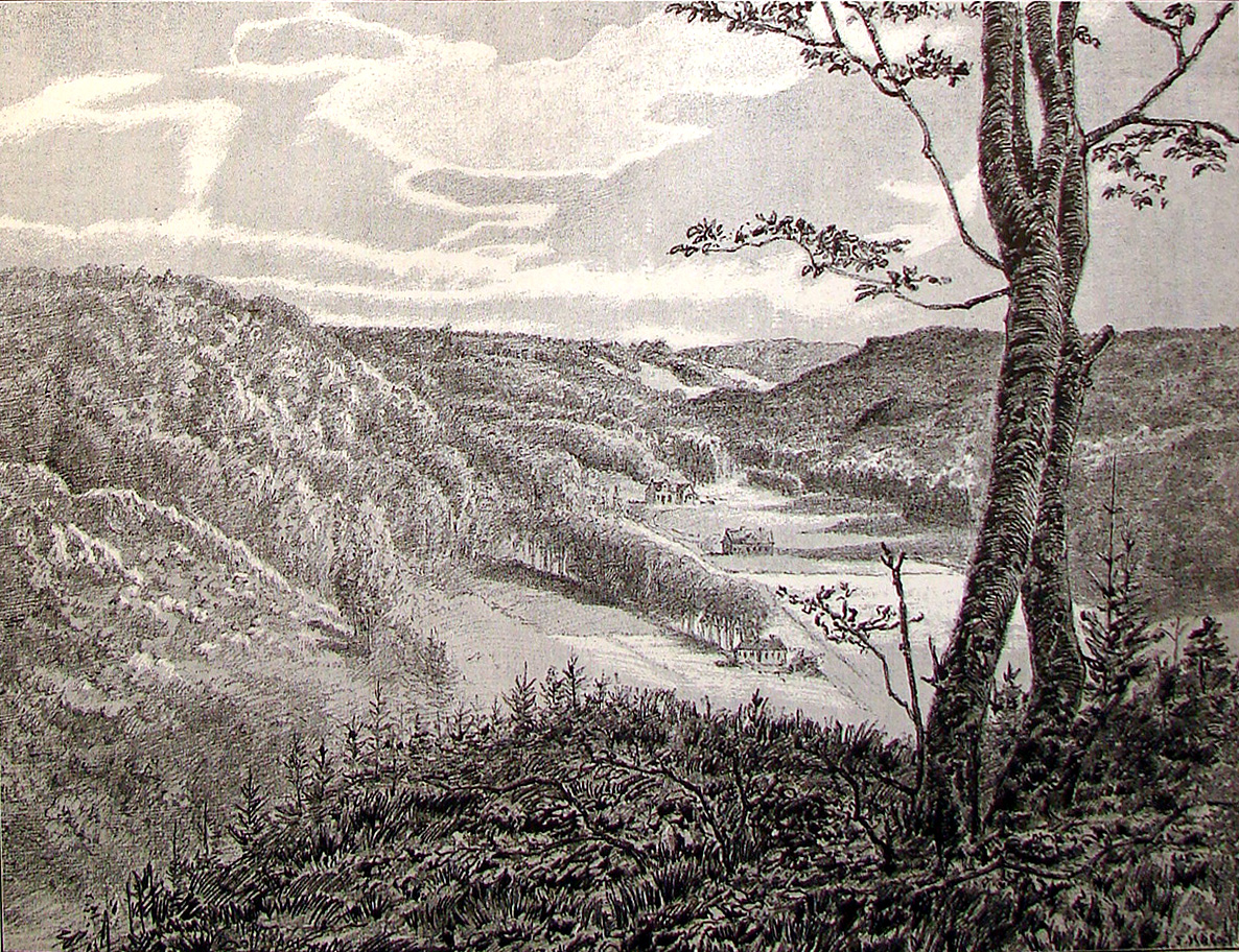 Grejsdalen set fra skærbækbakken mod Vejle. Det er en kilometerlang sænkning med 50-70 meter høje, skovklædte skrænter nordnordvest for Vejle.